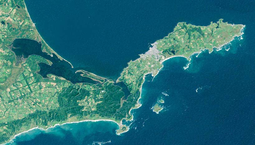 Nemuro Peninsula, Hokkaido, Japan.